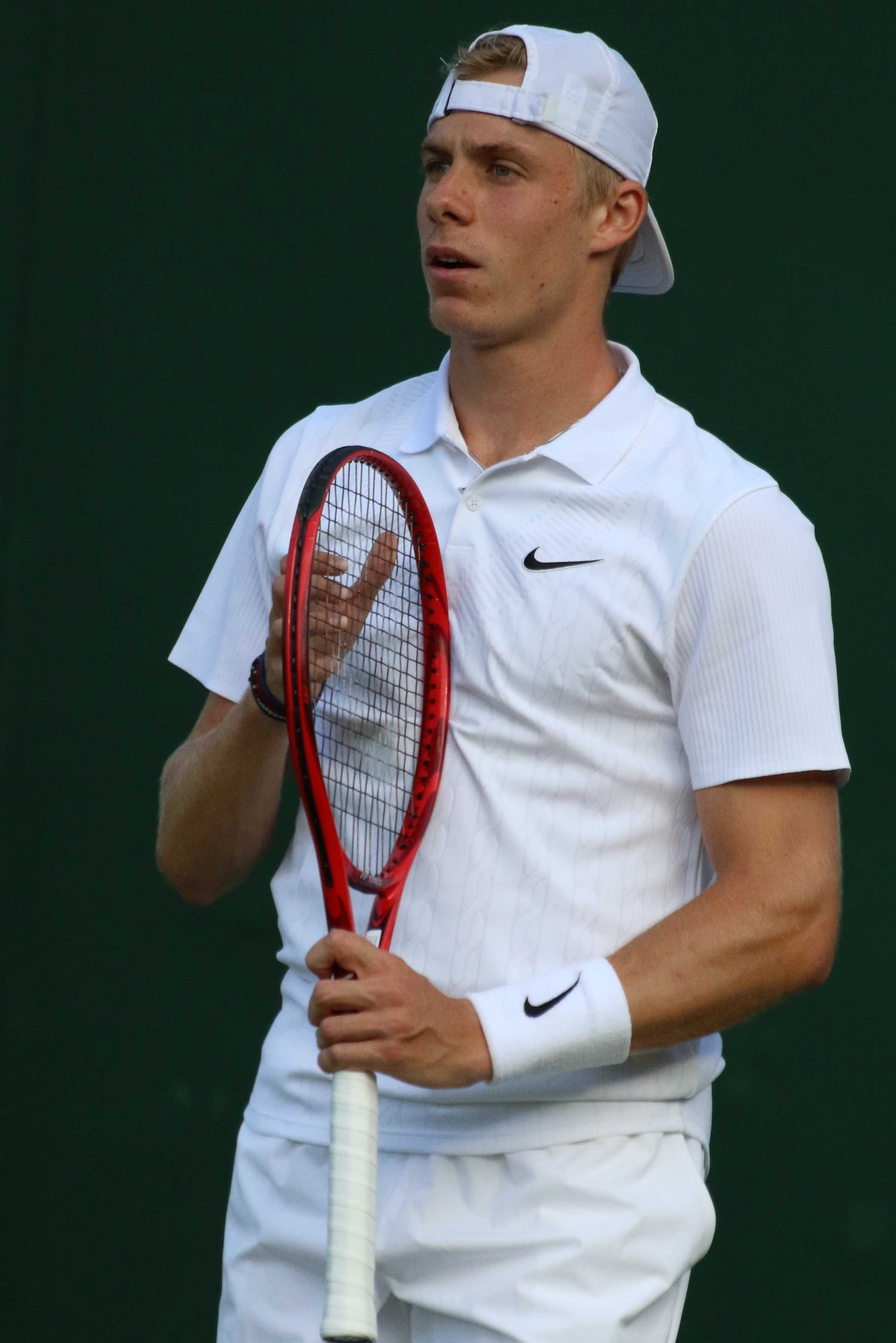 Shapovalov WM19 (26)